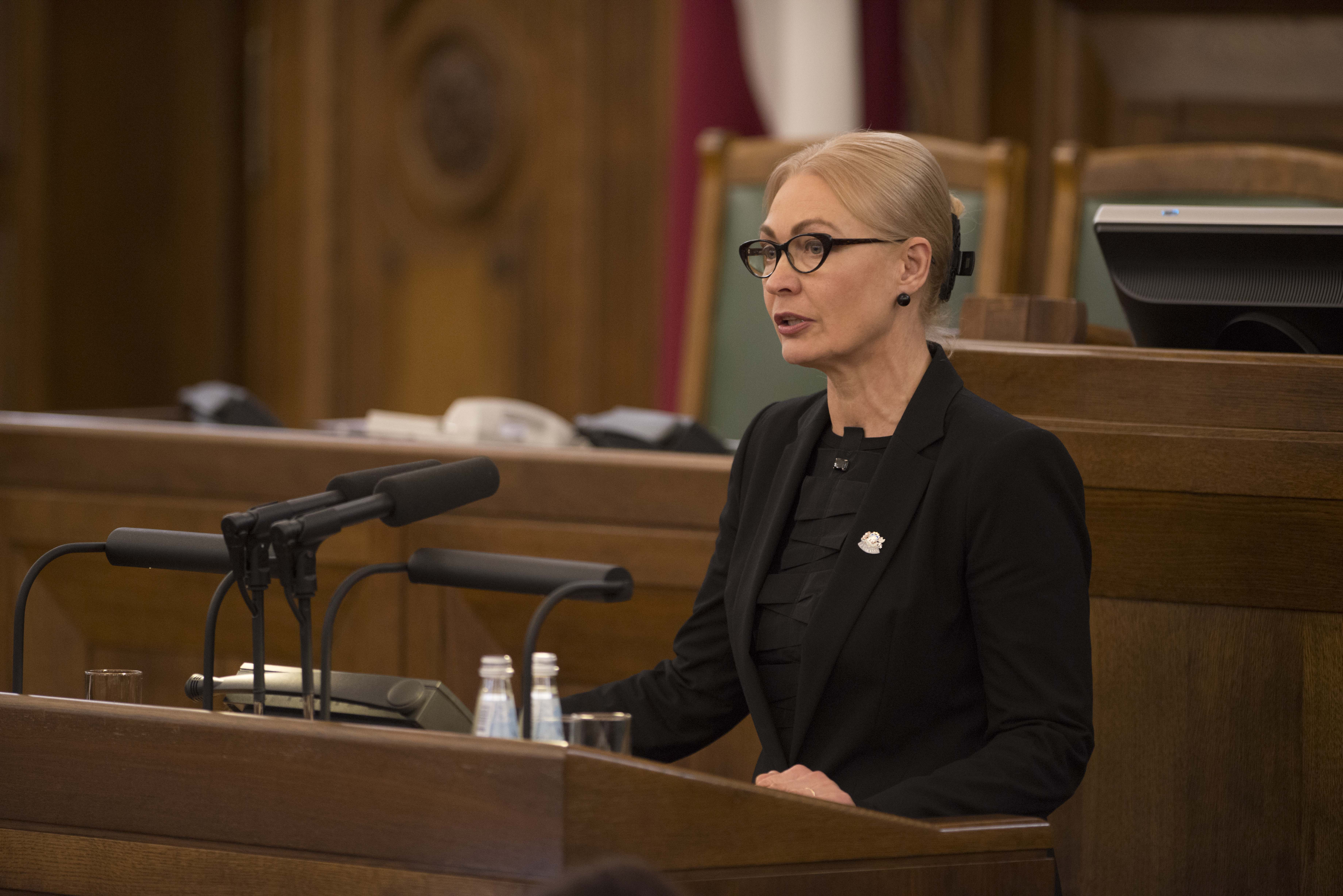 2014.gada 4.novembris. Deputāte Ingūna Rībena dod svinīgo solījumu. Foto: Juris Vīgulis, Saeimas Kanceleja Izmantošanas noteikumi: saeima.lv/lv/autortiesibas